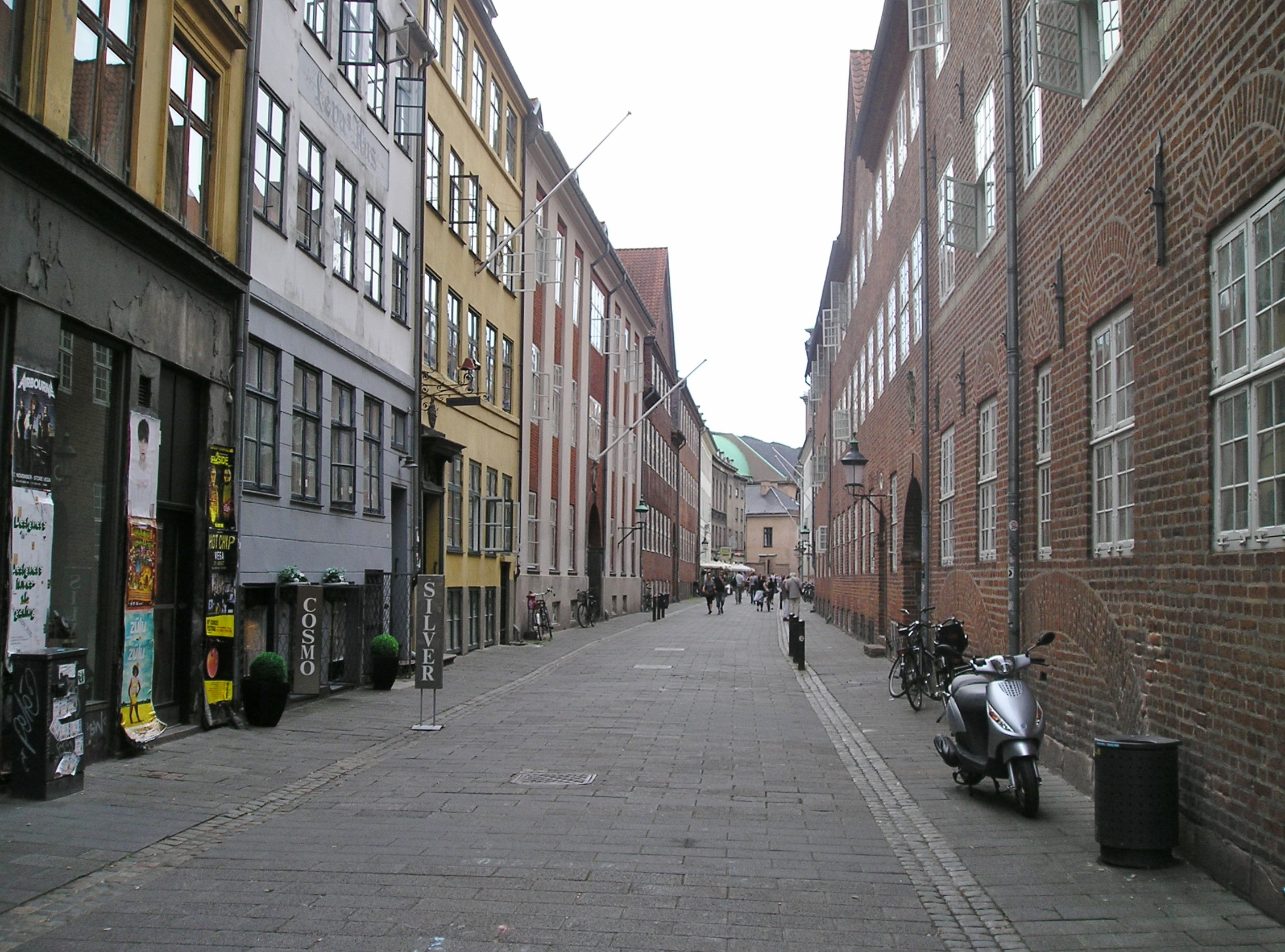 The street Store Kannikestræde in Copenhagen.